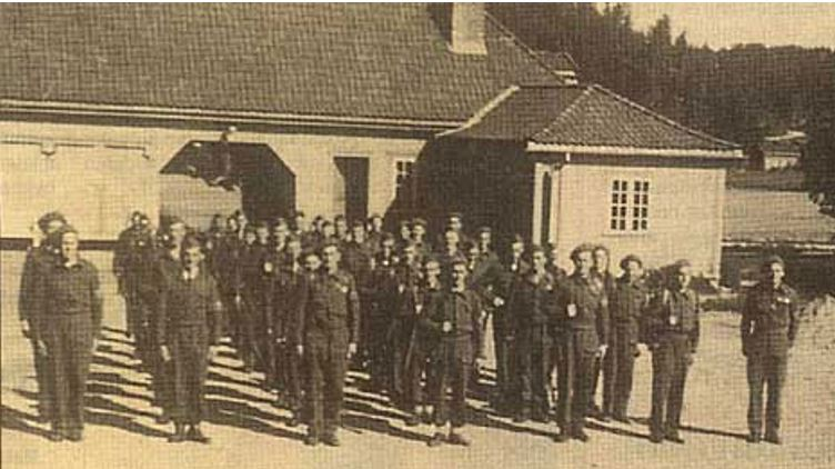 Norske soldater på innsiden av portnerboligen. Porten i bakgrunnen gikk rett ut i Hønen allé.